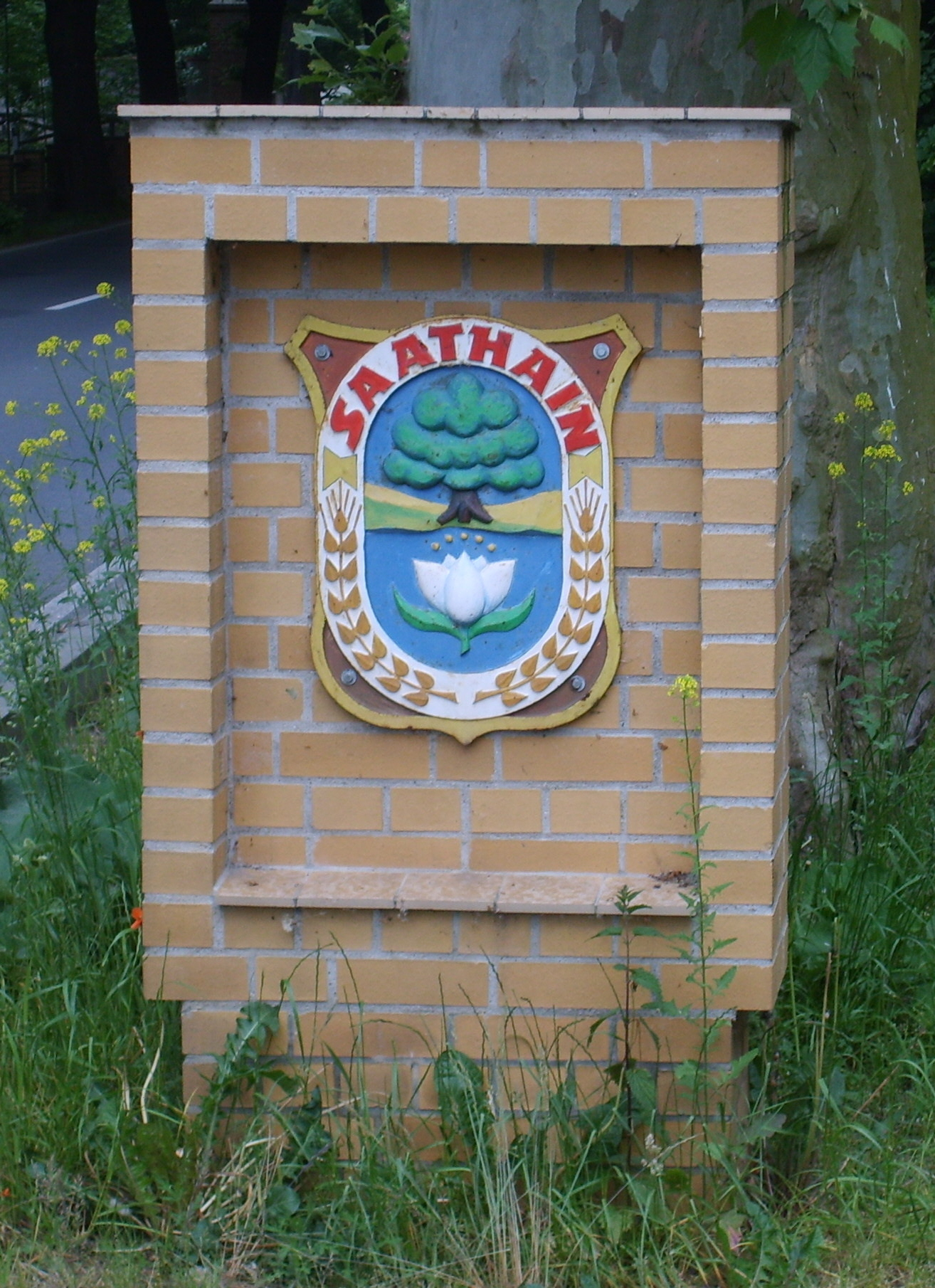 Wappenstein von Saathain am Ortseingang.